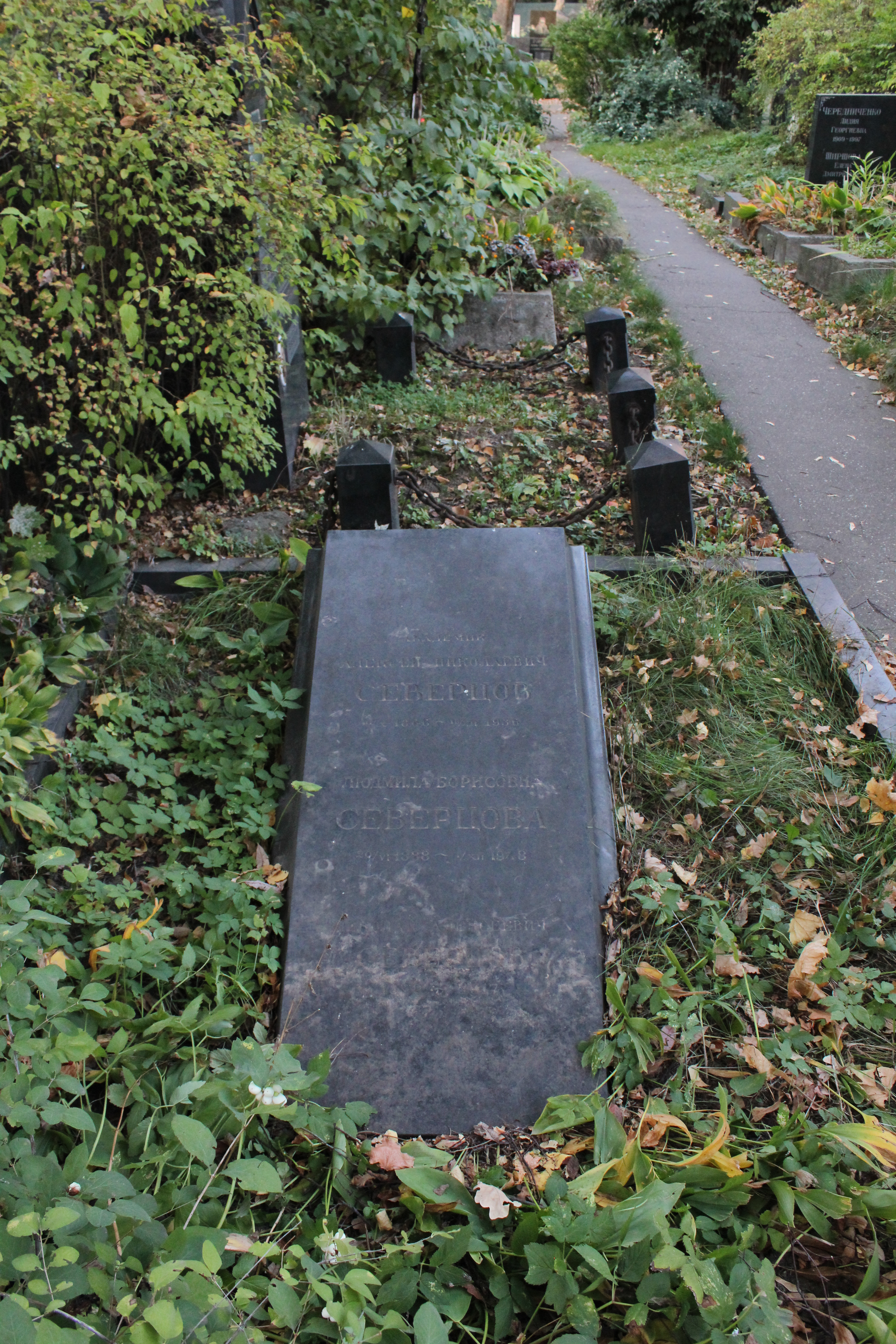 Могила Северцова Алексея Николаевича (1866-1936): Новодевичье кладбище,3 уч. 9 ряд, Хамовники, Центральный округ, Москва